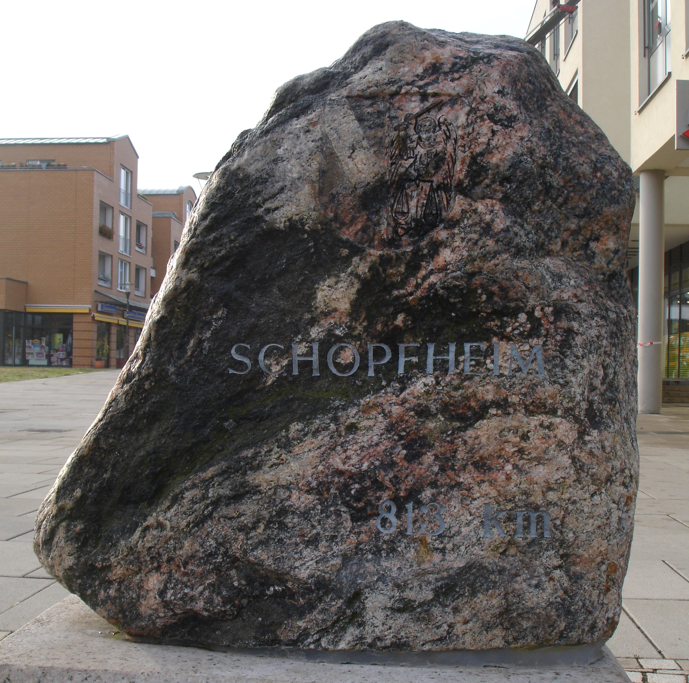 Kleinmachnow Meilenstein Partnergemeinde Schopfheim / milestone to community Schopfheim